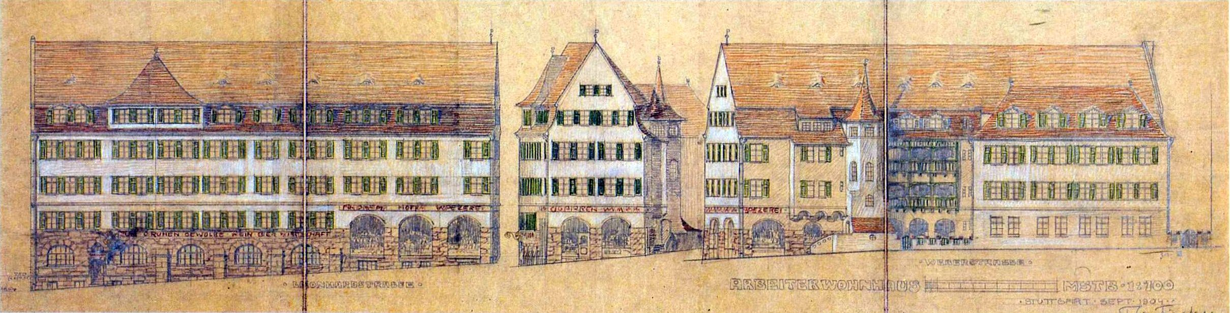 Haus Leonhardstraße 11–13, Weberstraße 9, Stuttgart, Aufriss, Architekt: Theodor Fischer.